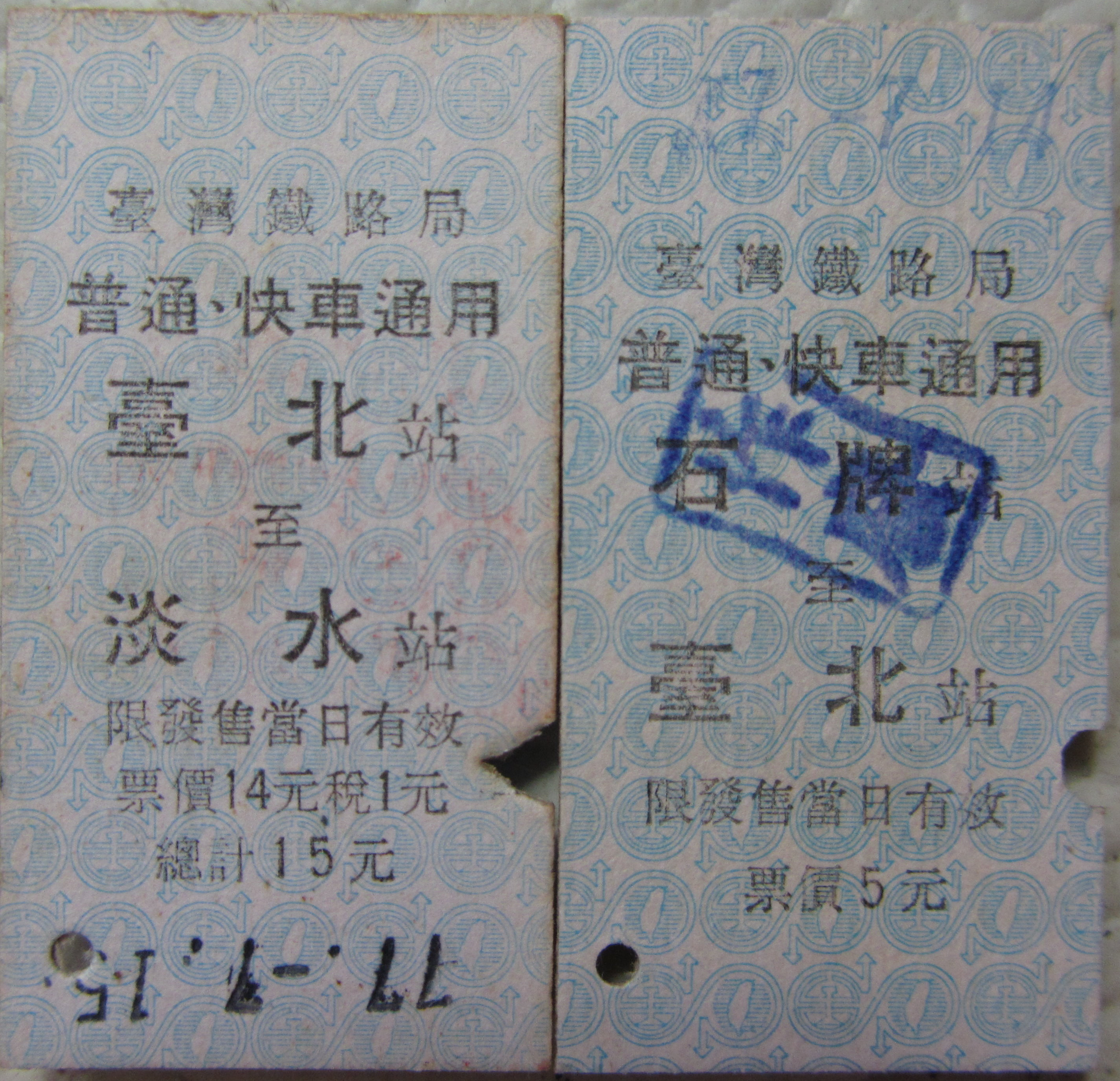 臺灣鐵路管理局淡水線名片式車票